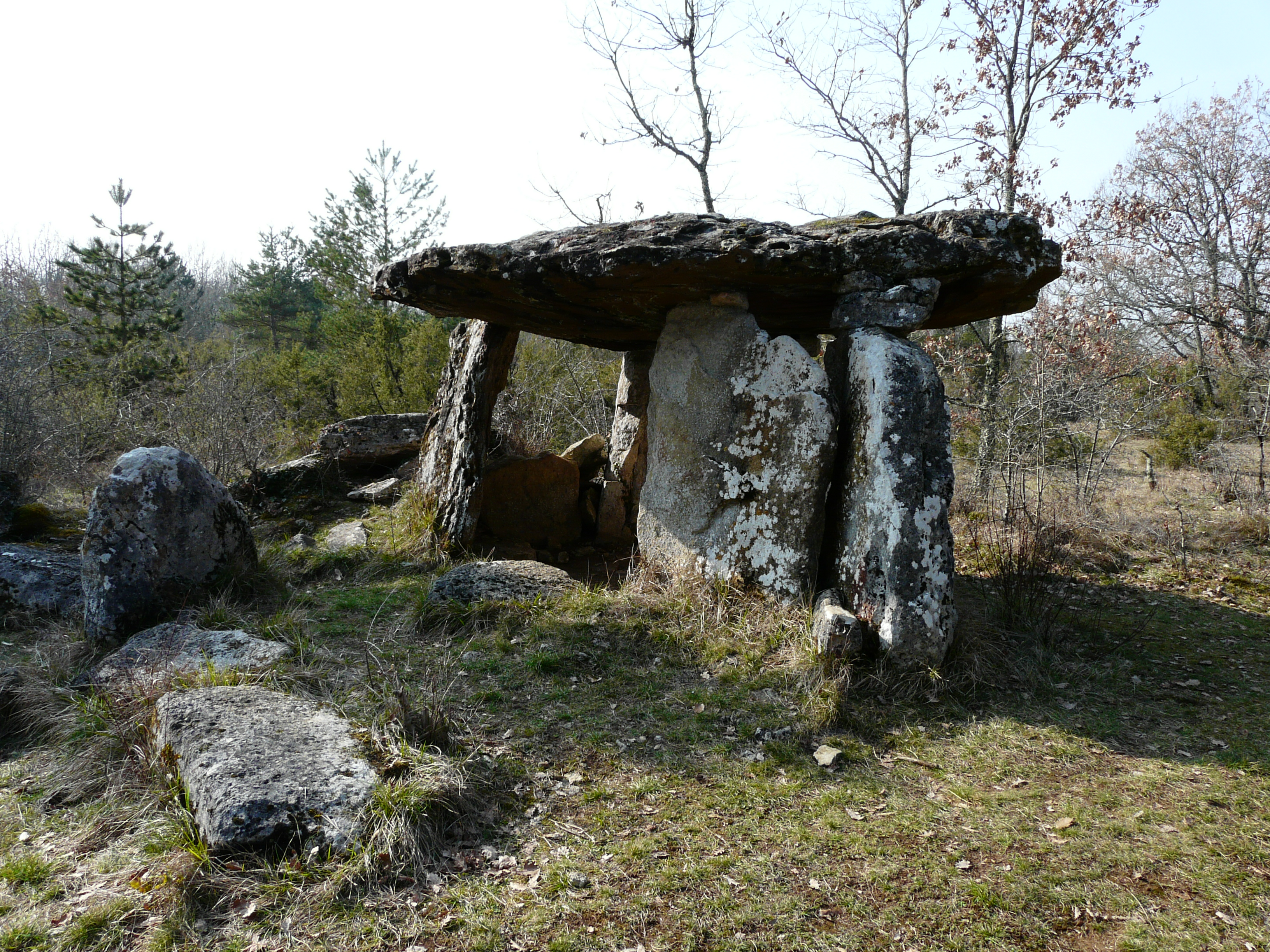 Le dolmen de Peyrelevade, Paussac-et-Saint-Vivien, Dordogne, France.